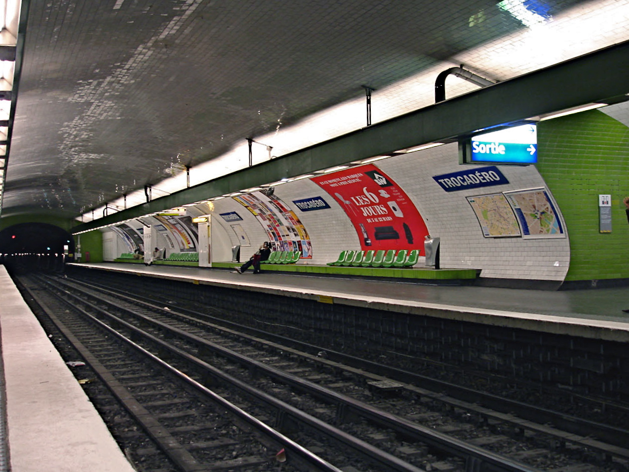 Station Trocadéro, de la ligne 9 du métro de Paris, France.